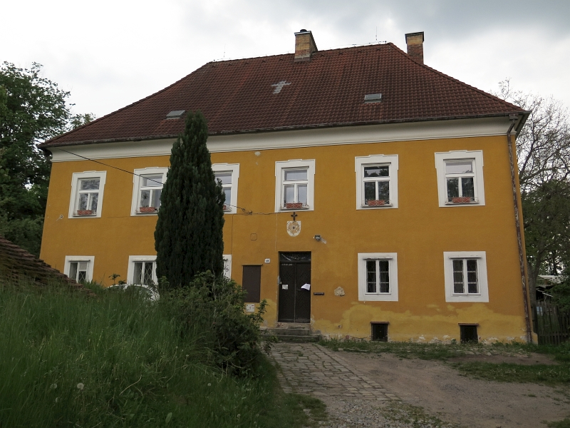 Fara, Boršov nad Vltavou 49, Boršov nad Vltavou.